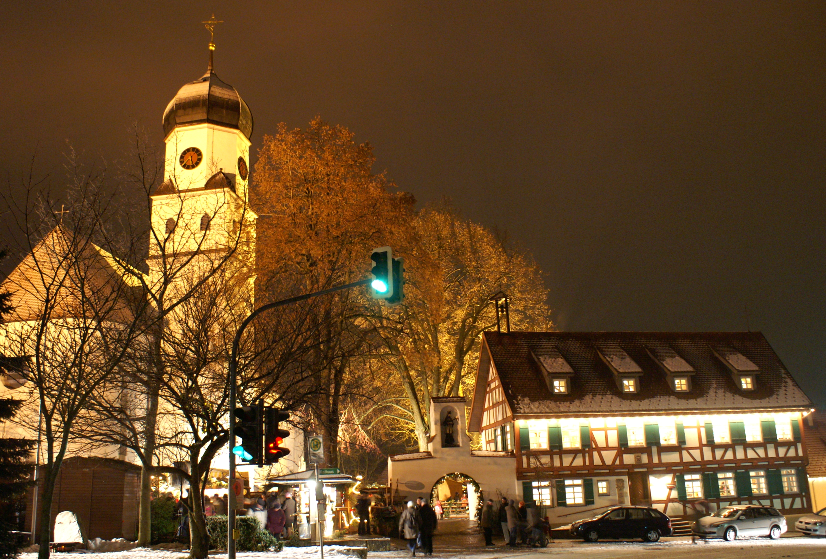 Weihnachtsmarkt 2008 in Westerheim